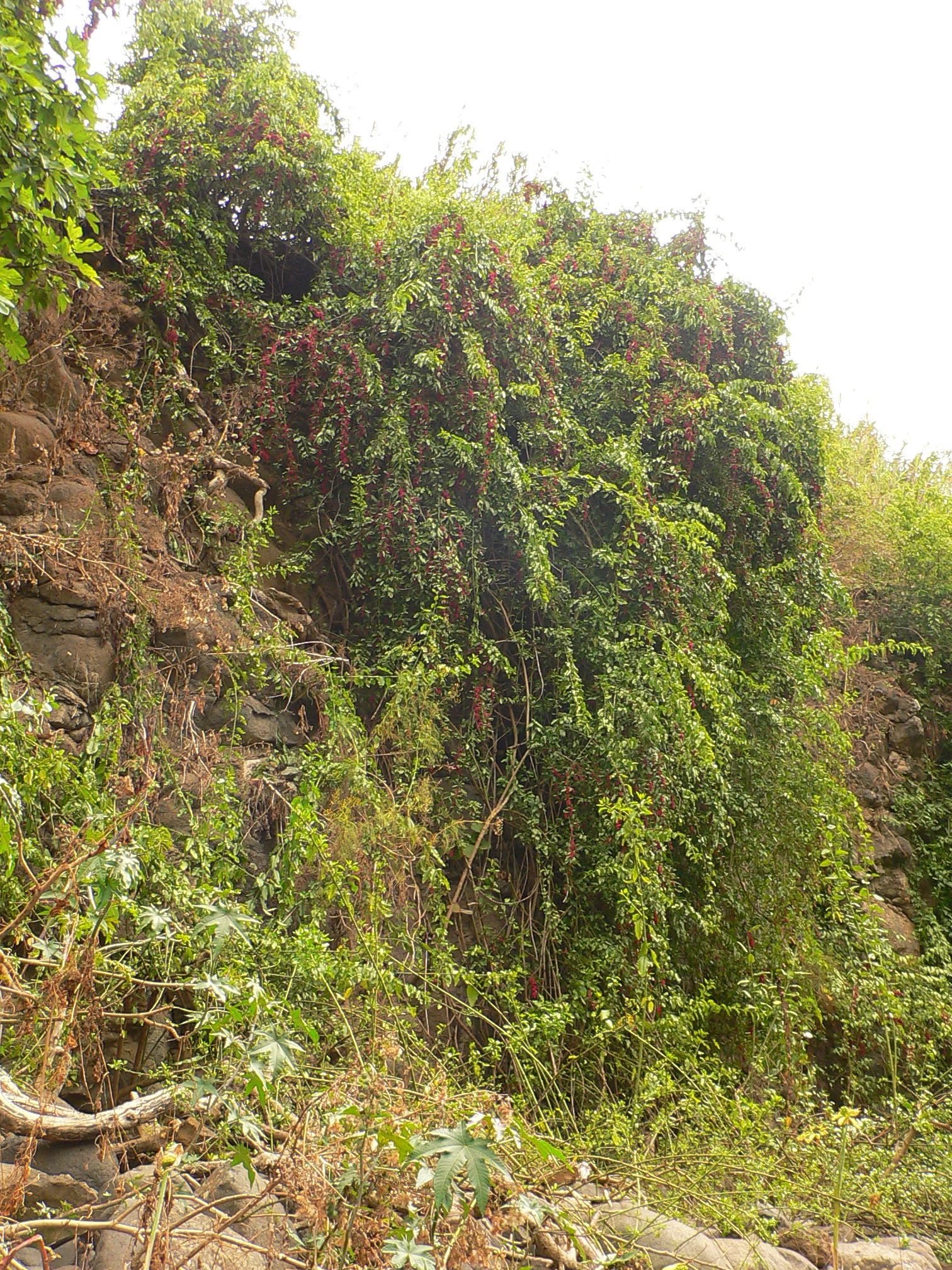 Bosea yervamora crecienda en la pared rocosa de Barranco Alonso, Gran Canaria